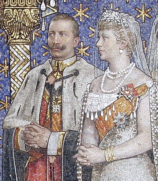 Wilhelm II., Deutscher Kaiser with his wife, Empress Auguste Viktoria on a mosaic in Kaiser-Wilhelm-Gedächtniskirche, Berlin. Mosaic (detail) designed by Hermann Schaper, manufactured by Puhl & Wagner